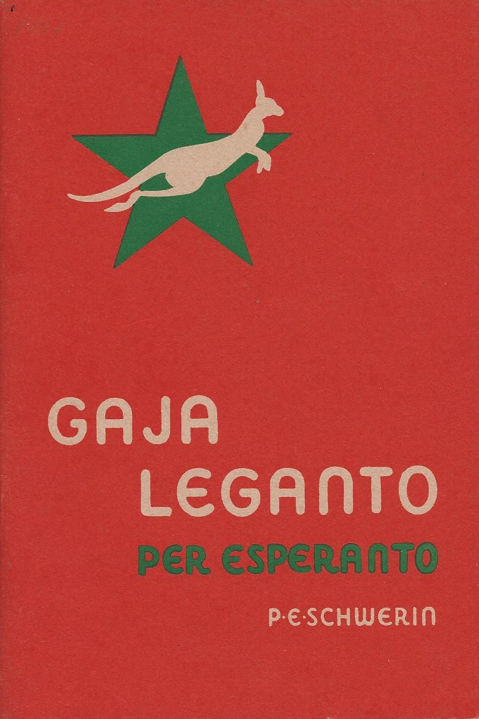 librokovrilo de "Gaja Leganto per Esperanto", 1945